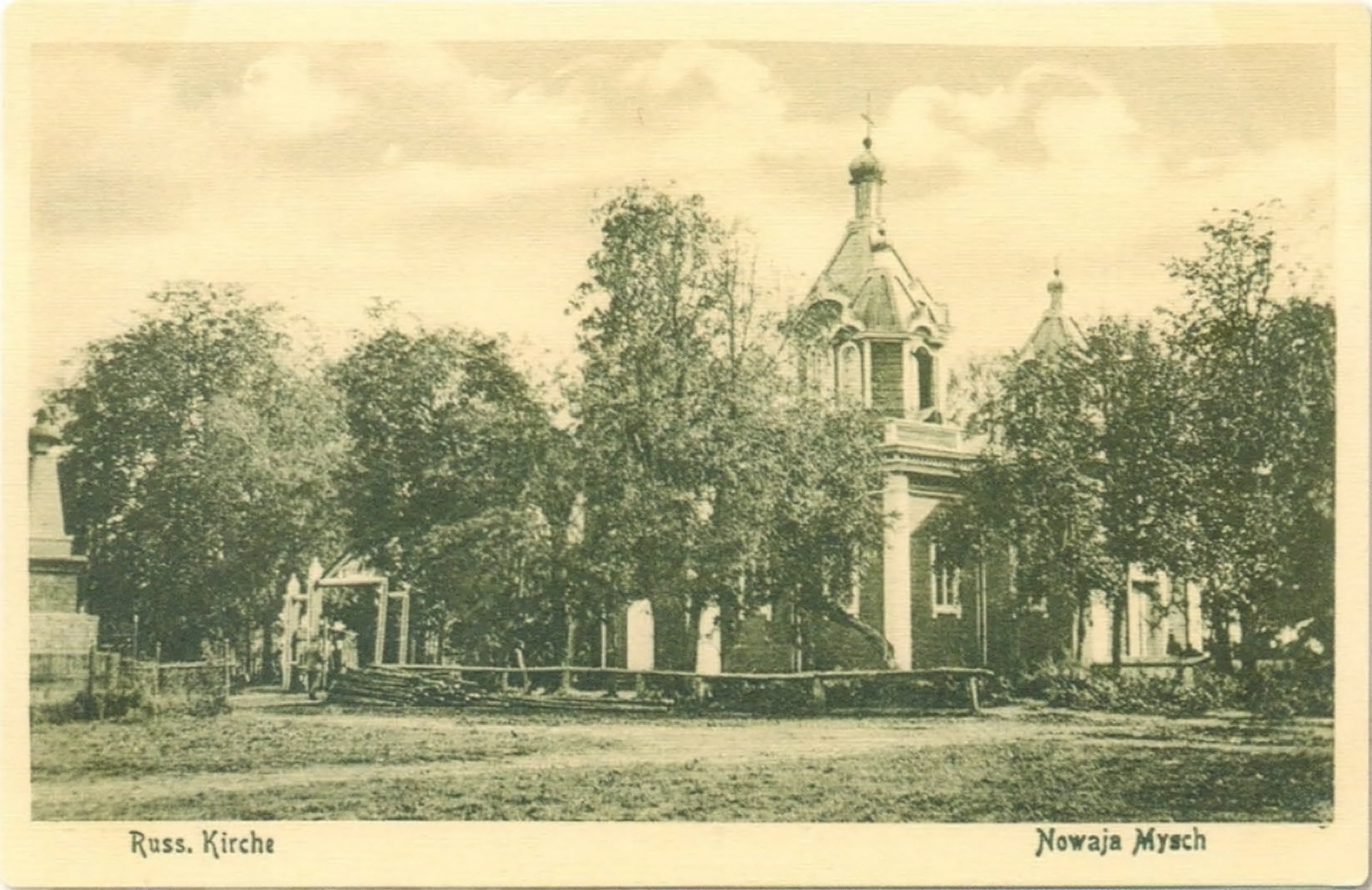 Беларуская (тарашкевіца): Новая Мыш (Novaja Myš), пляц Рынак (plac Rynak). Царква